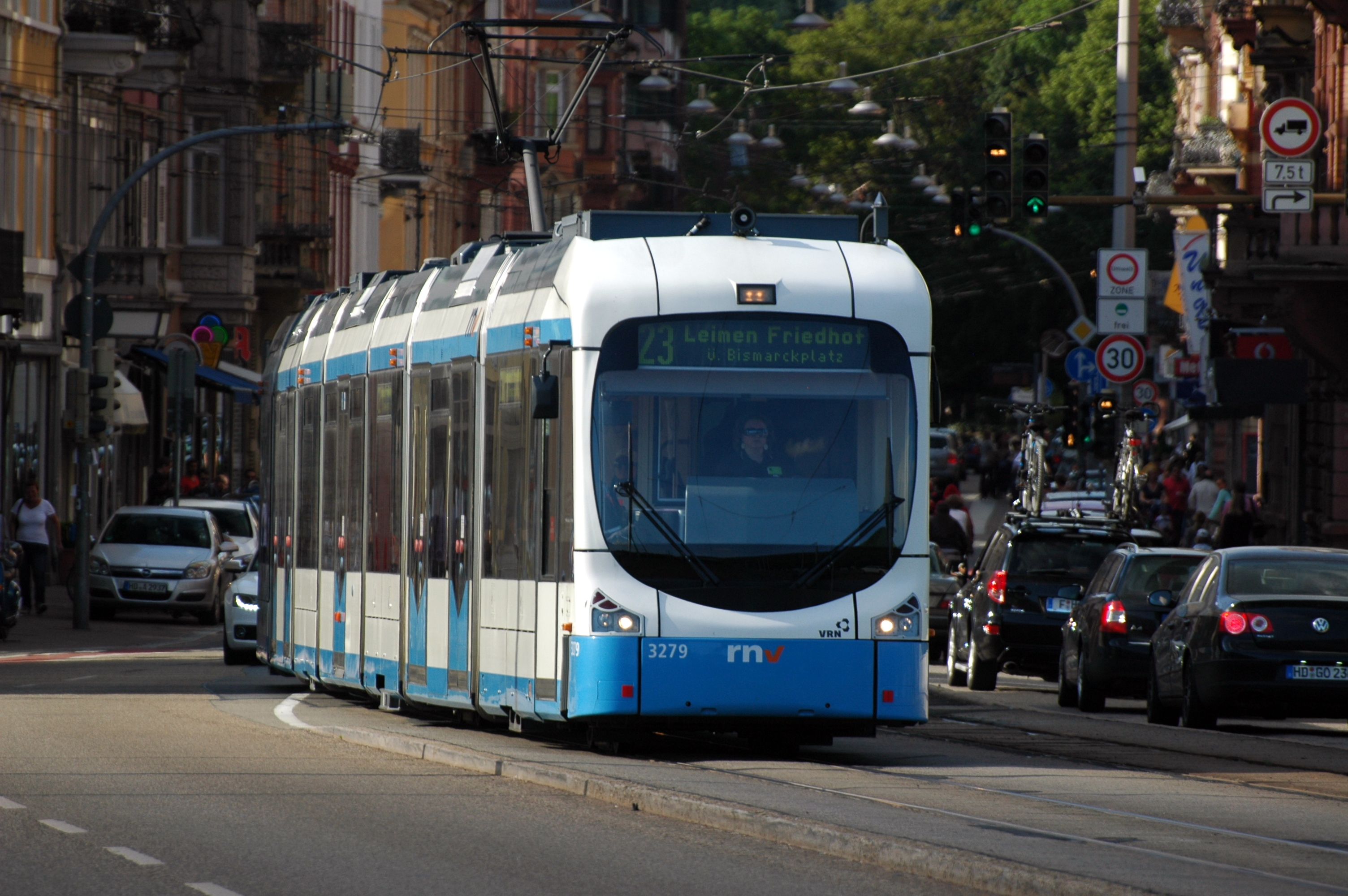 Heidelberg - Bombardier RNV8 - RNV 3279